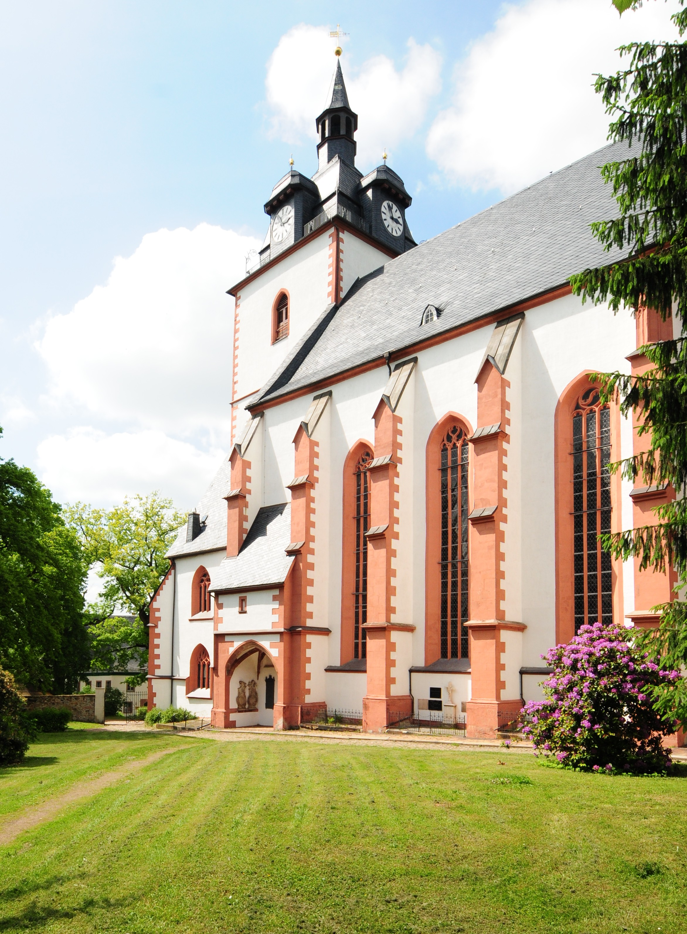 Mittweida, Ev. Stadtkirche St. Marien (Sachsen, Deutschland)